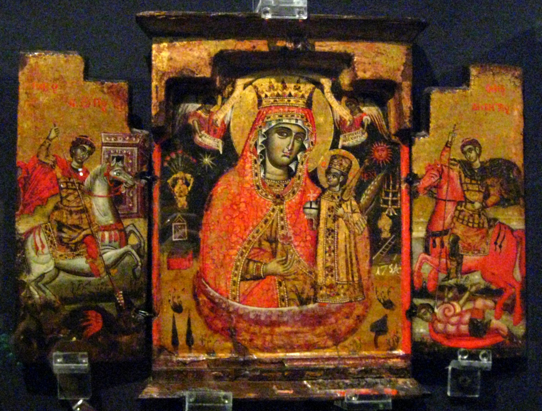 Триптих: Богоматерь Неувядающий Цвет, чудо Святого Георгия и чудо Святого Димитрия. 1754.